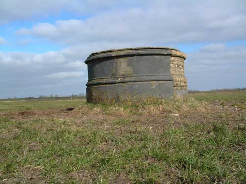 De punt van de abdij in Berne